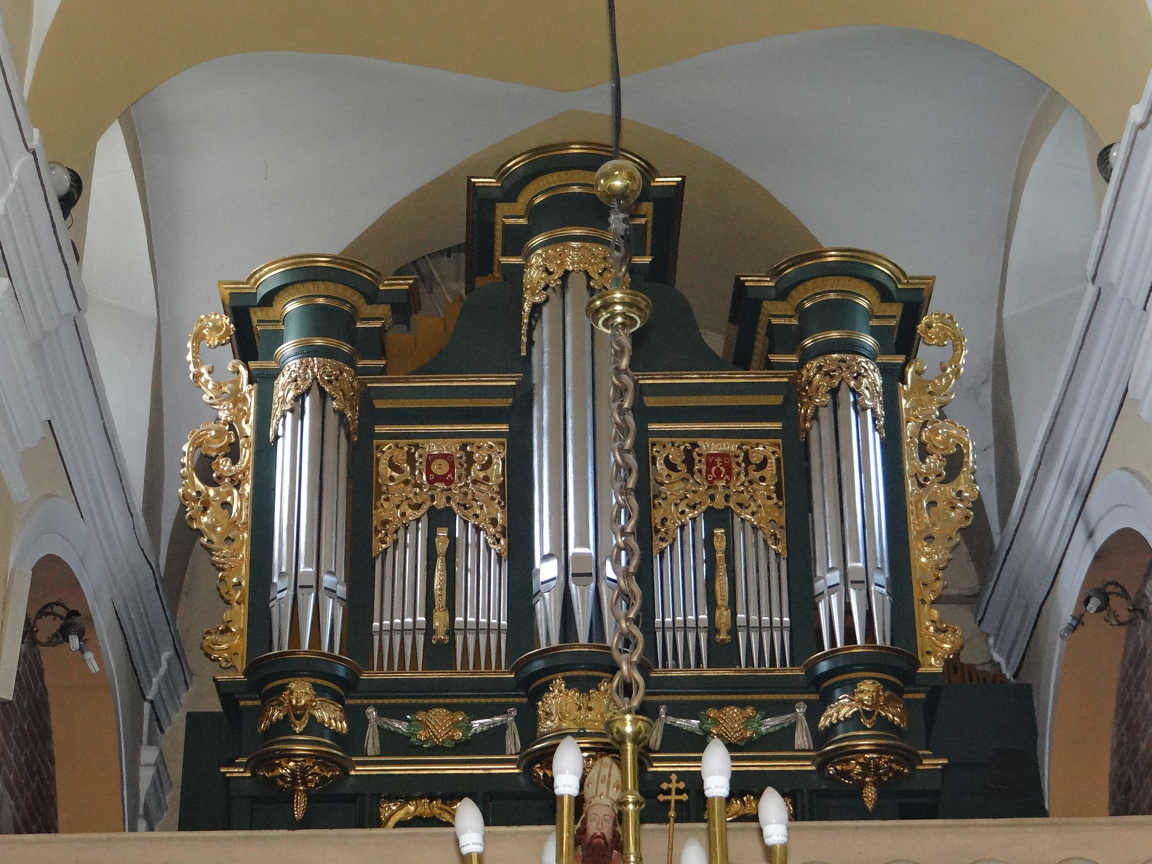 Kościelec - rzymskokatolicki kościół parafialny p.w. św. Wojciecha, 1230, 1628-1634, 1865, XX (wnętrze)